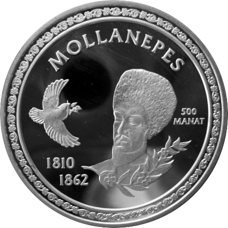 Памятная монета Туркменистана